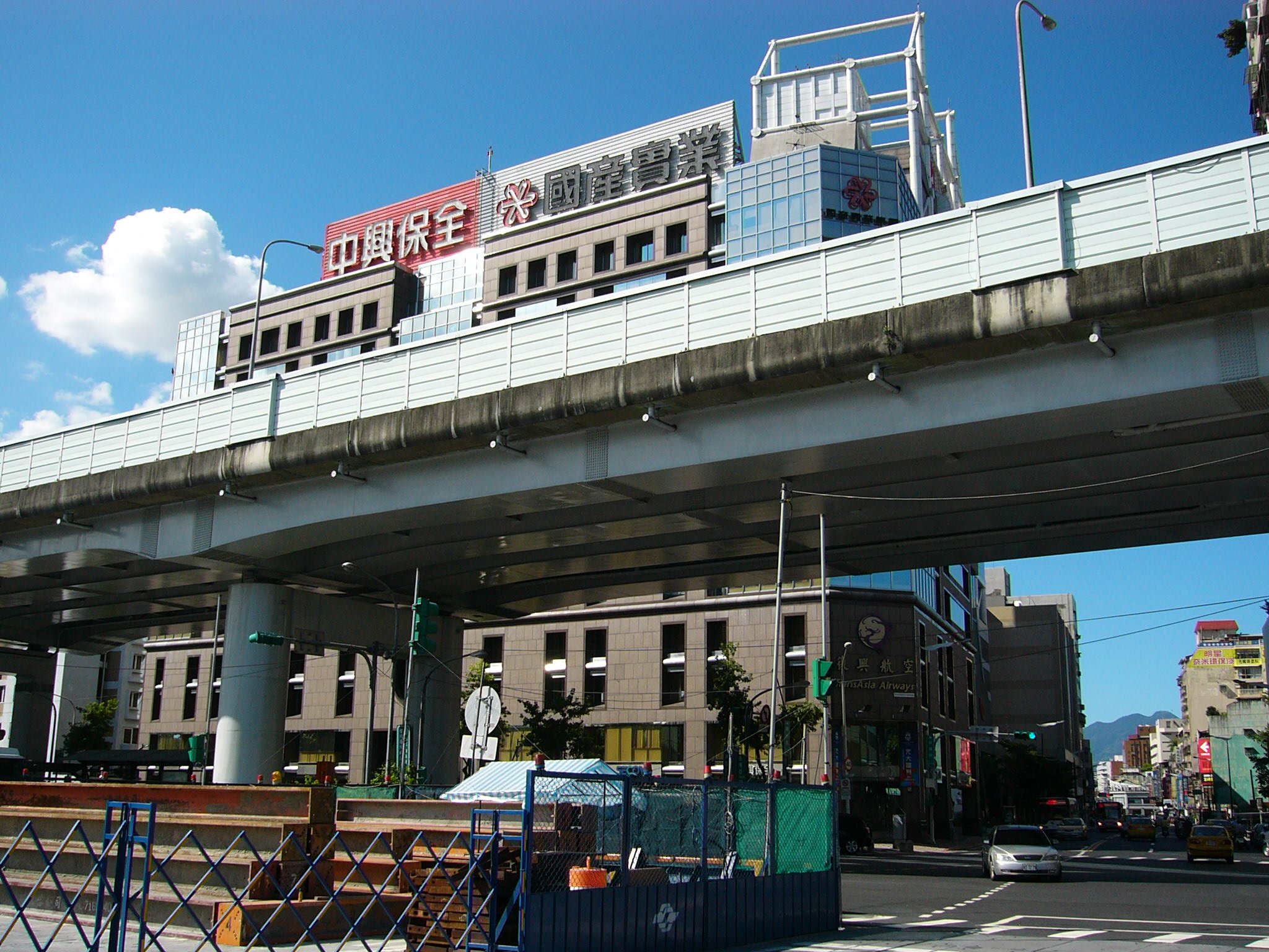 中文（台灣）: 國產實業大樓，位於臺北市大同區鄭州路139號。